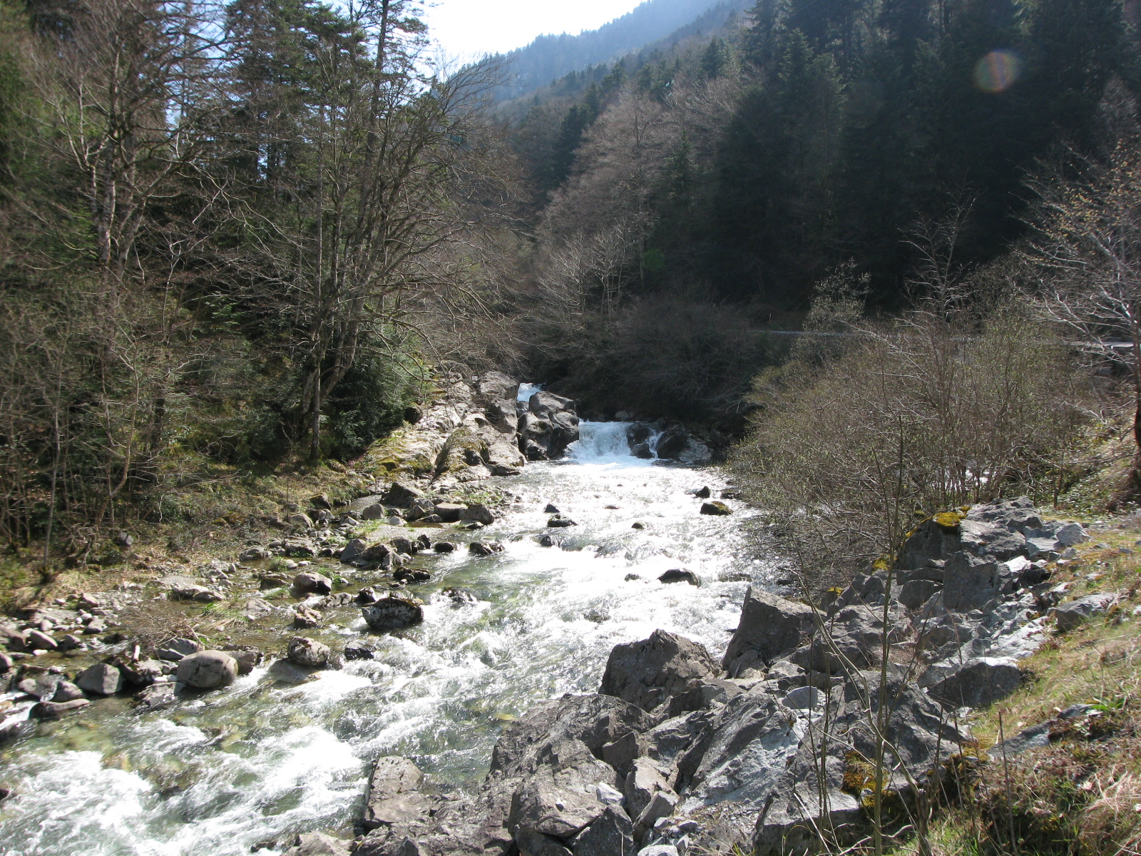 Gave d'Ossau vers Eaux-Chaudes (Pyrénées-Atlantiques) (Pyrénées).